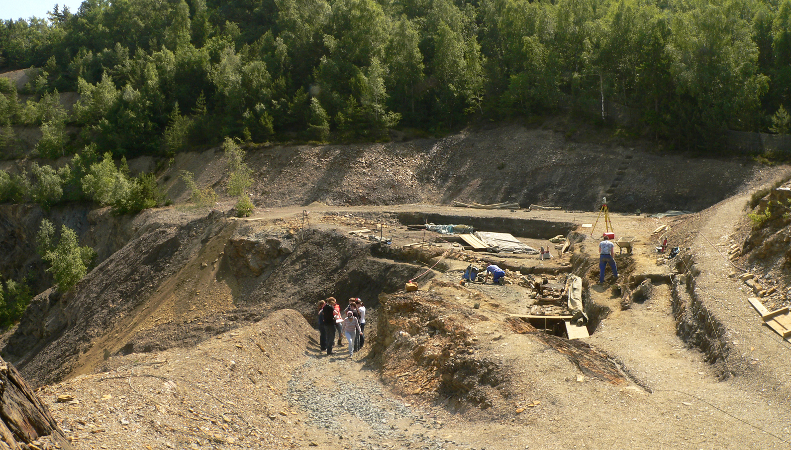 Ausgrabungsstelle des mittelalterlichen Bergwerks im Alten Lager am Rammelsberg